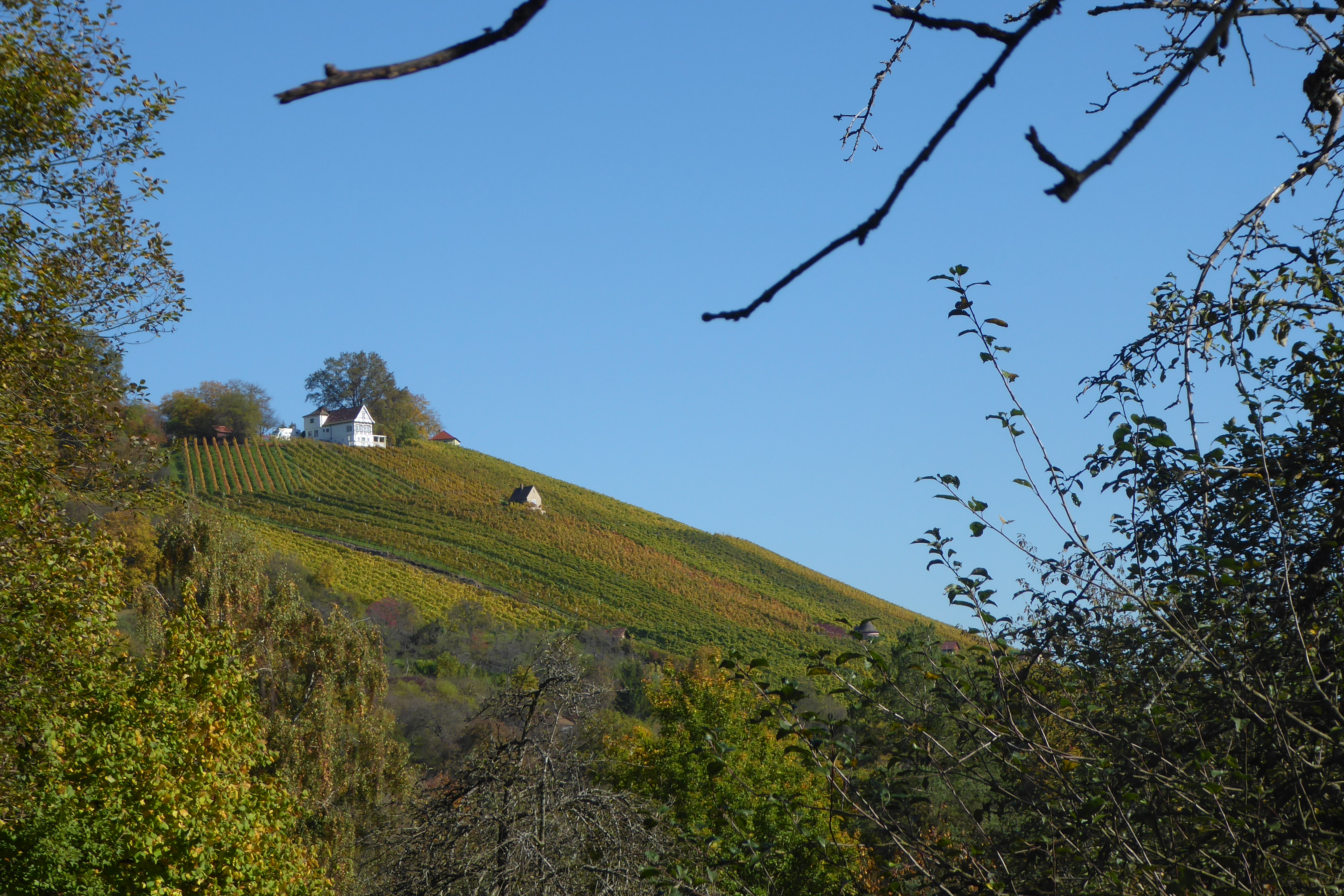 Schorndorf Grafenberg Weinberg